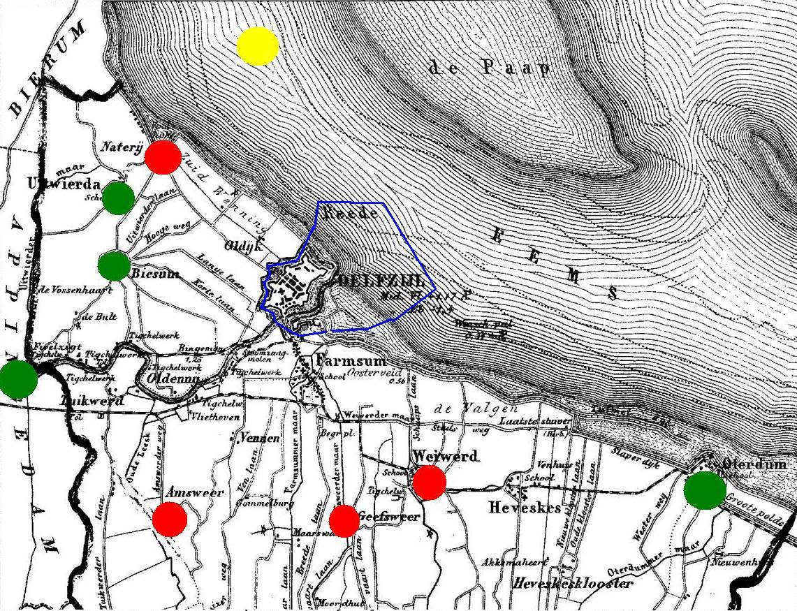 Gedeelte uit kaart, bewerkt tot overzicht van de situatie tijdens het beleg van Delfzijl van 1813 - 1814. Bron